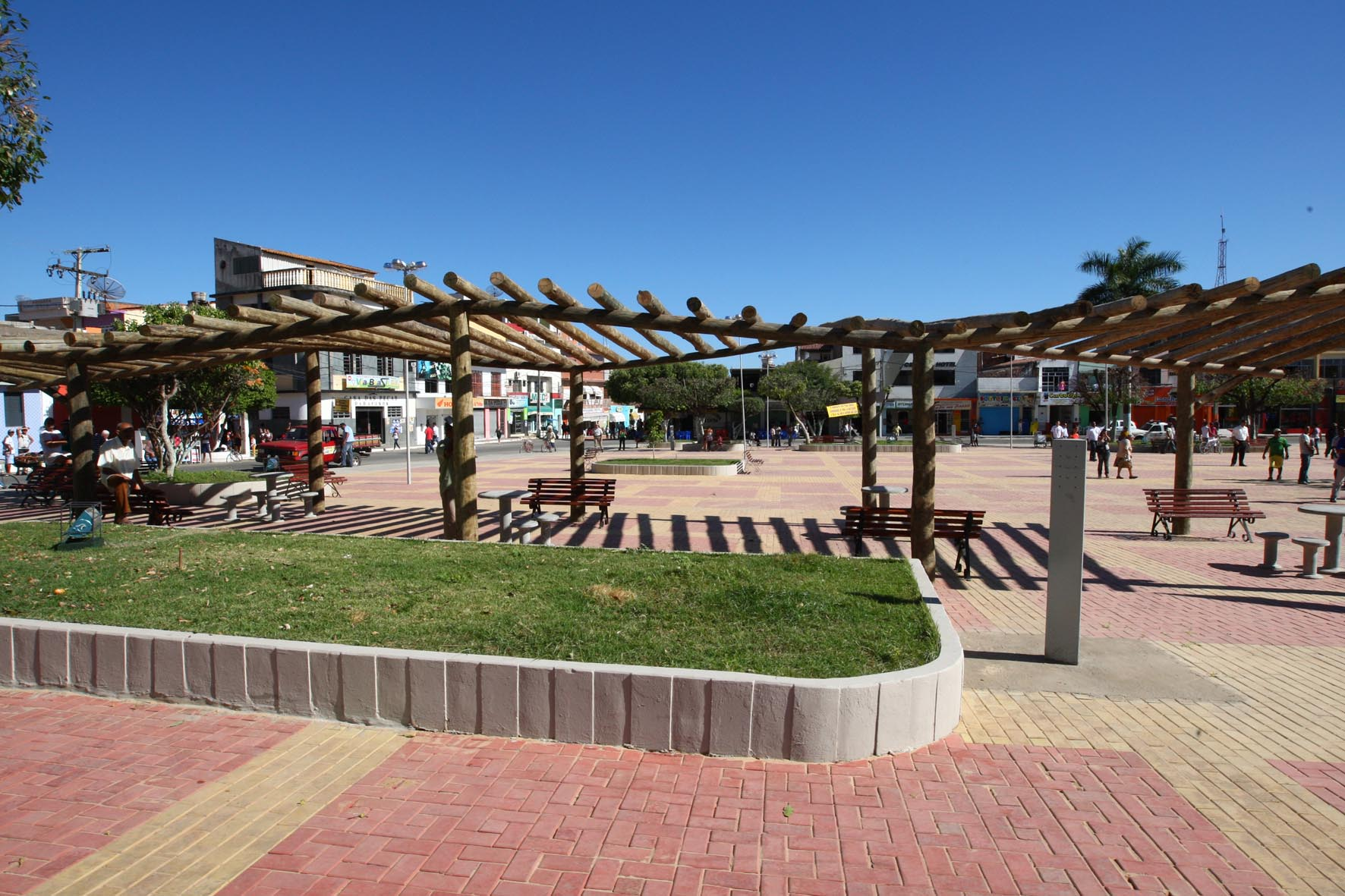 Na foto:Foto Manu Dias/AGECOM